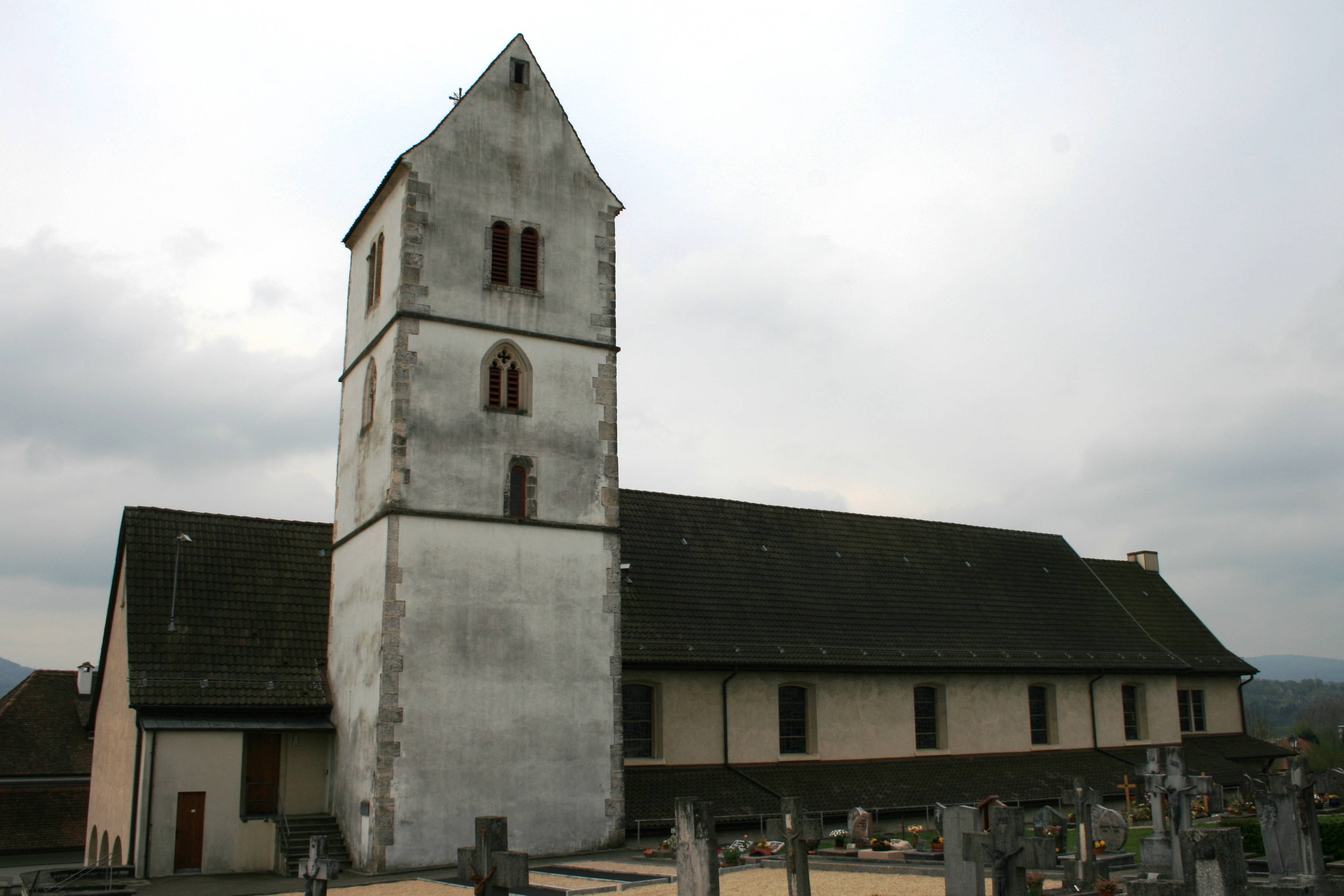 Kirche von Alle JU, Schweiz